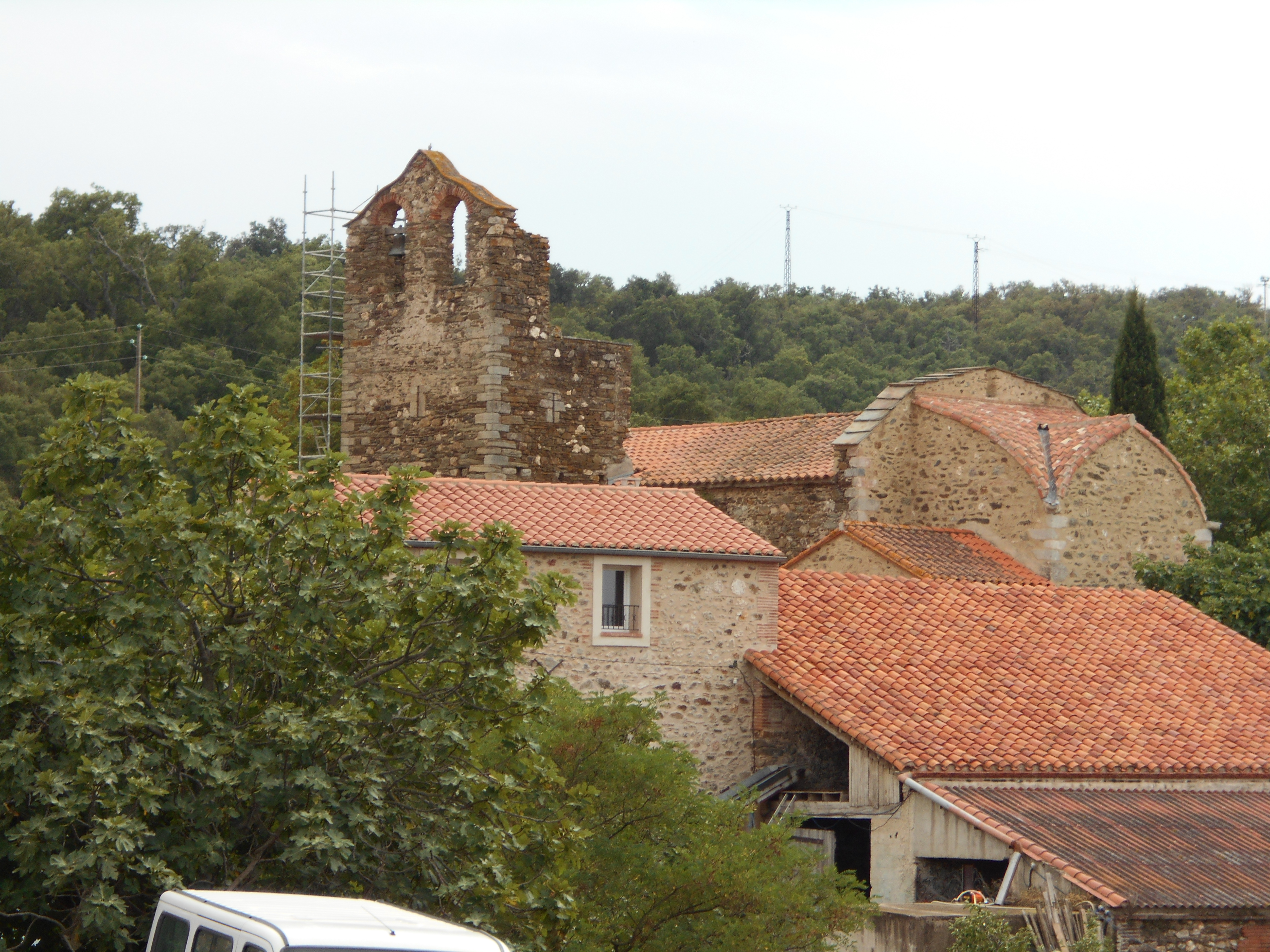 Vista de Torderes